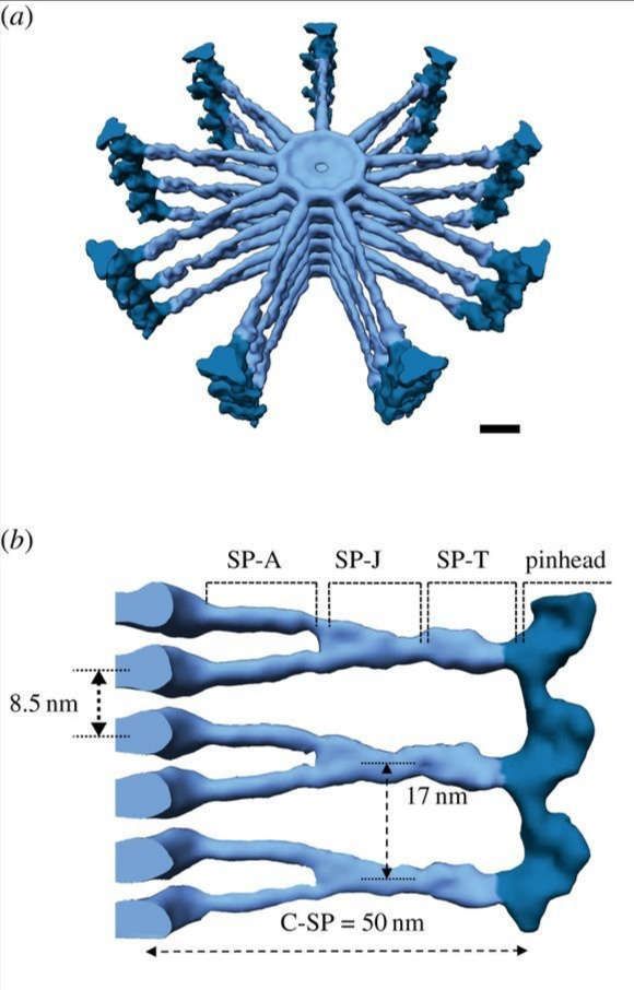 Fig. 3. Imágenes de tomografía crioelectrónica de la rueda de carro en Trichonympha. a) Representación tridimensional de una pila de ruedas de carro cartwheels (azul claro) con cabezas de alfiler pinheads (azul oscuro). Cada rueda de carro está compuesta por nueve radios de aproximadamente 50 nm de largo que emanan del cubo central (diámetro: aprox. 22 nm). Barra de escala, 10 nm. b) Vista lateral de la pila de ruedas de carro destacando el radio de ruedas de carro (C-SP). Los cubos (en el lado izquierdo) se apilan con una periodicidad de 8,5 nm. Los radios en las ruedas de carro adyacentes se emparejan y se fusionan a aproximadamente 20 nm del cubo. El radio se divide estructuralmente en un brazo de radio (SP-A), una unión de radio (SP-J) y una punta de radio (SP-T).